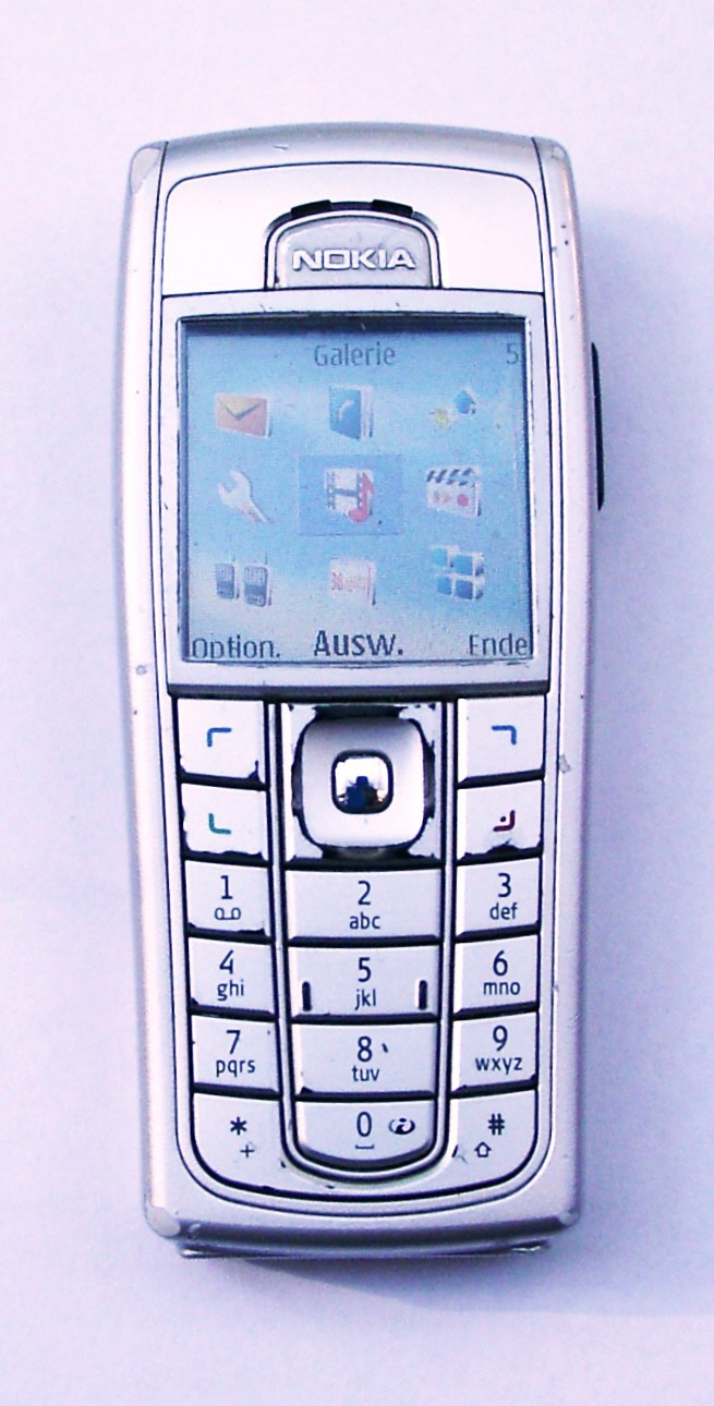 Nokia 6230i silver